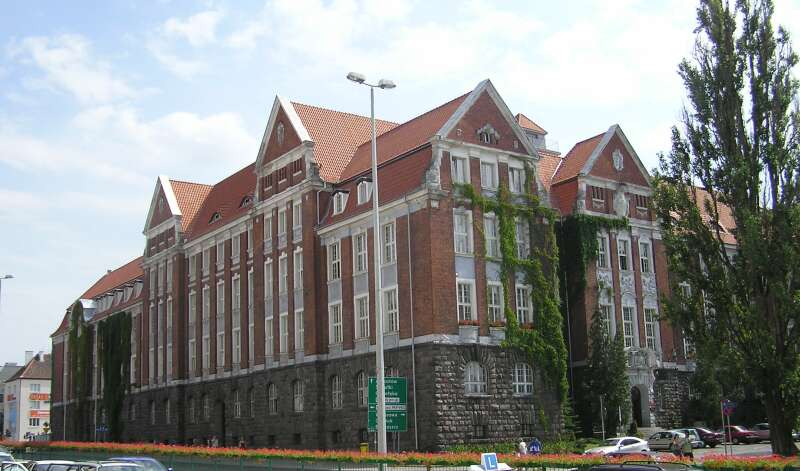 Olsztyn, ul. Emilii Plater 1 - dawna siedziba rejencji, po 1945 dyrekcja rejonowa PKP, obecnie siedziba Urzędu Marszałkowskiego i Wojewódzkiego Sądu Administracyjnego w Olsztynie (zabytek nr A-2441 z d. 30.08.1988)